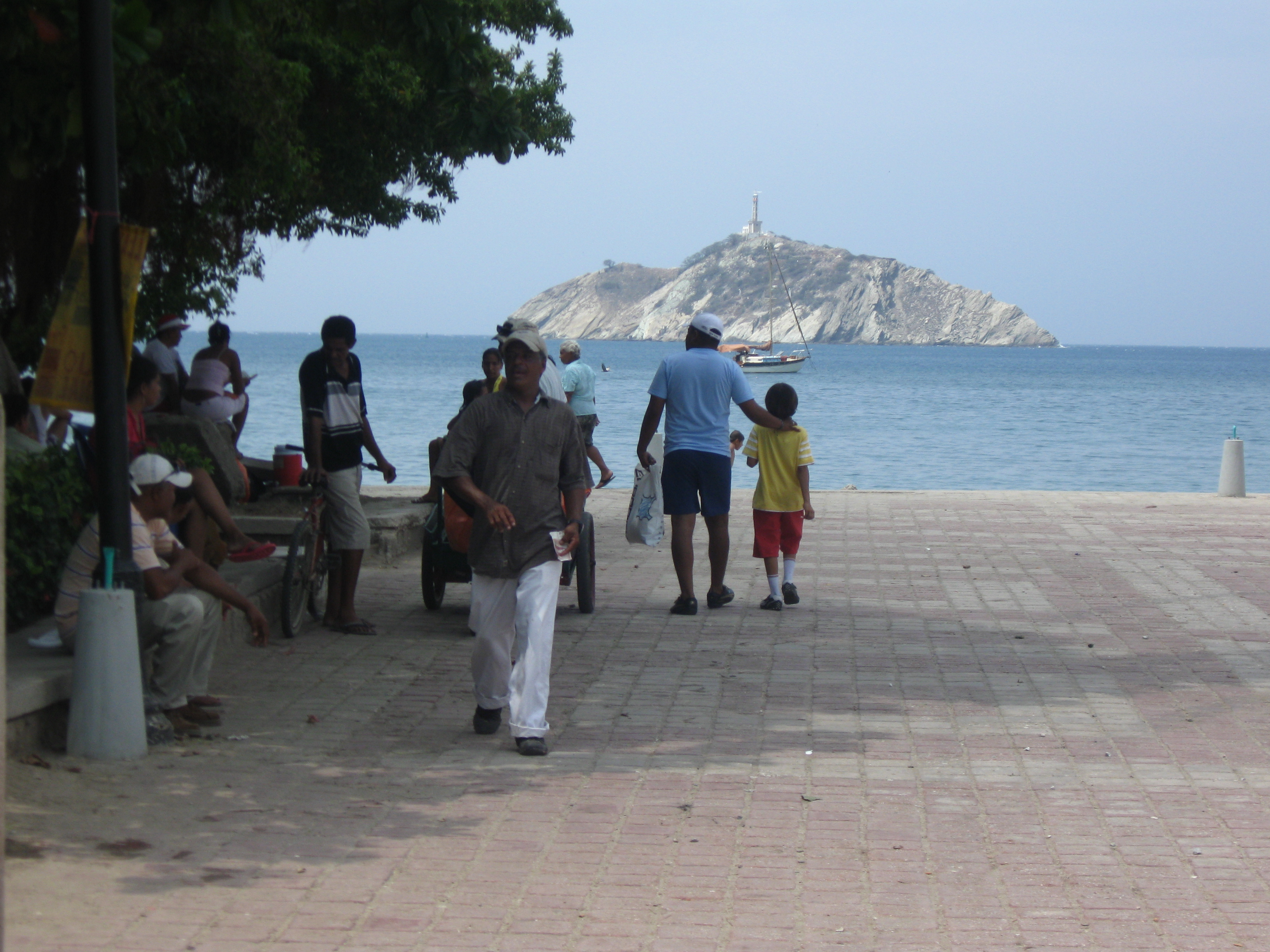 Fotografia del la bahia de Santa Marta, Paseo peatonal